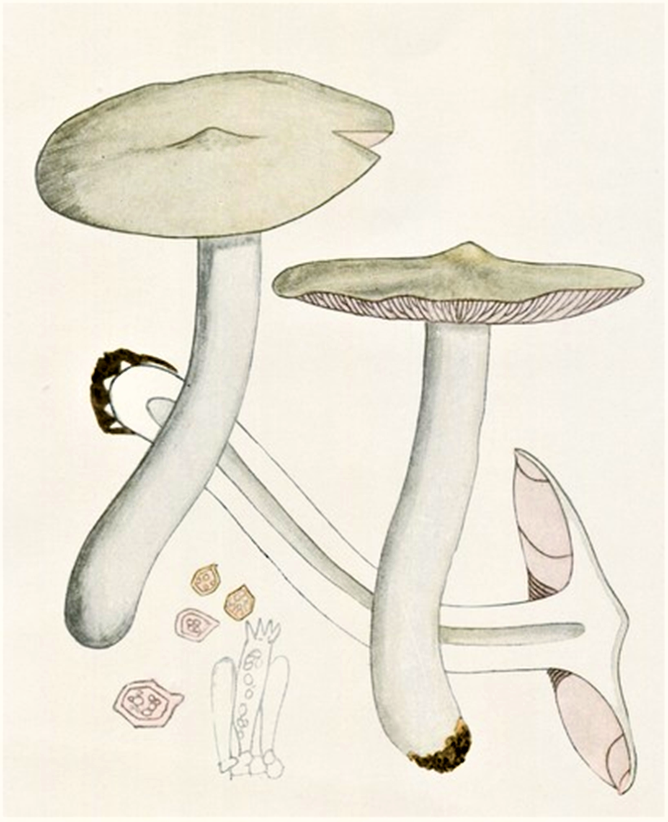 Giacomo Bresadola: Entoloma clypeatum (L., 1753) P.Kumm. (1871), Syn. Rhodophyllus clypeatus (L.) Quél. (1886)